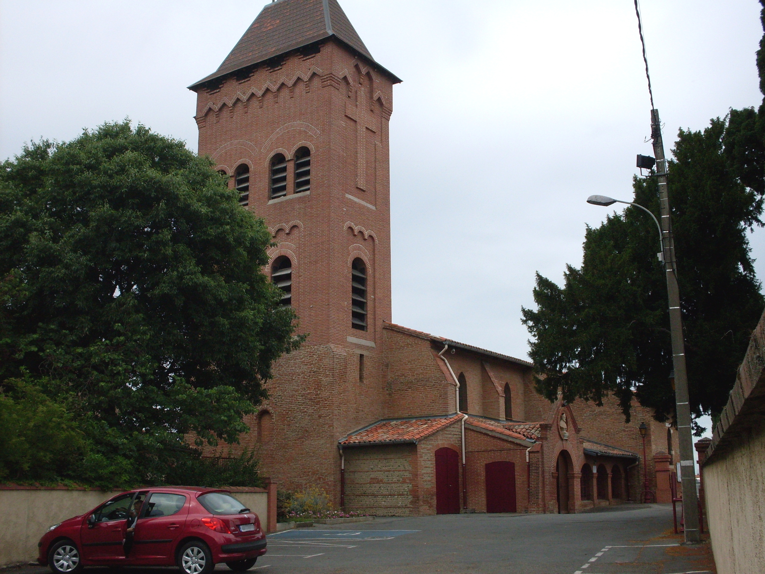 Fenouillet, près de Toulouse, l’église Saint Médard.